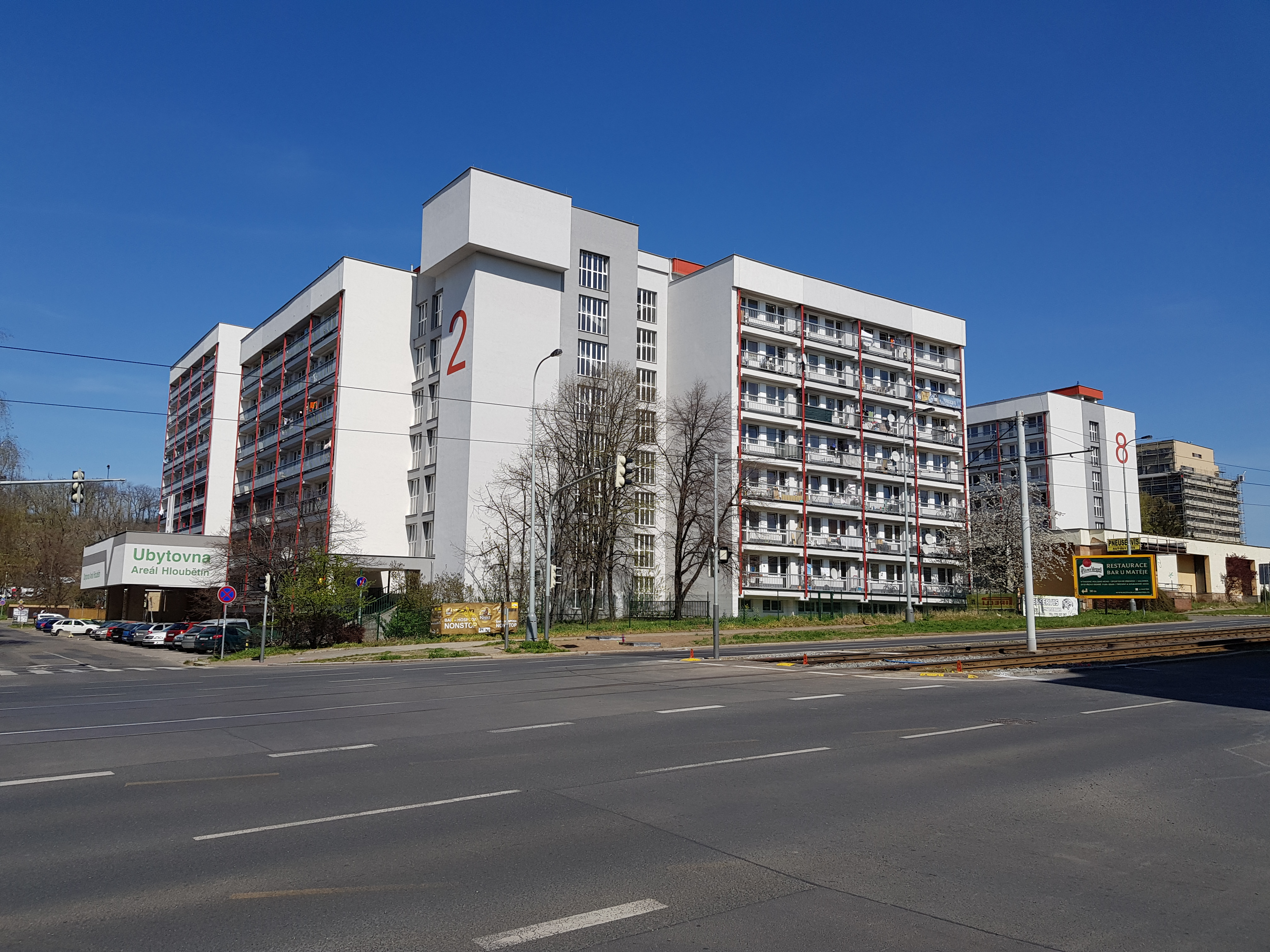 Ubytovna Areál Hloubětín, Slévačská 744/1, Praha 14-Hloubětín